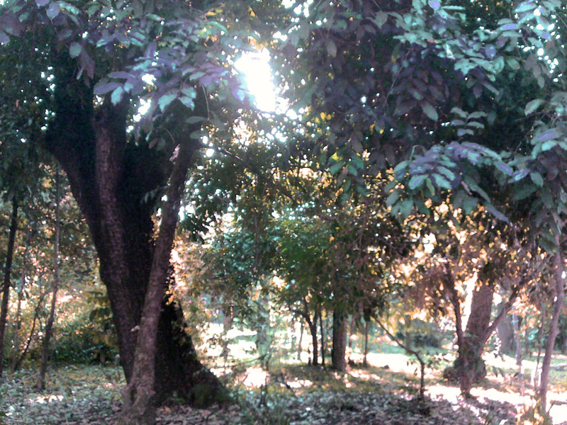 Árvores do Parque Piqueri